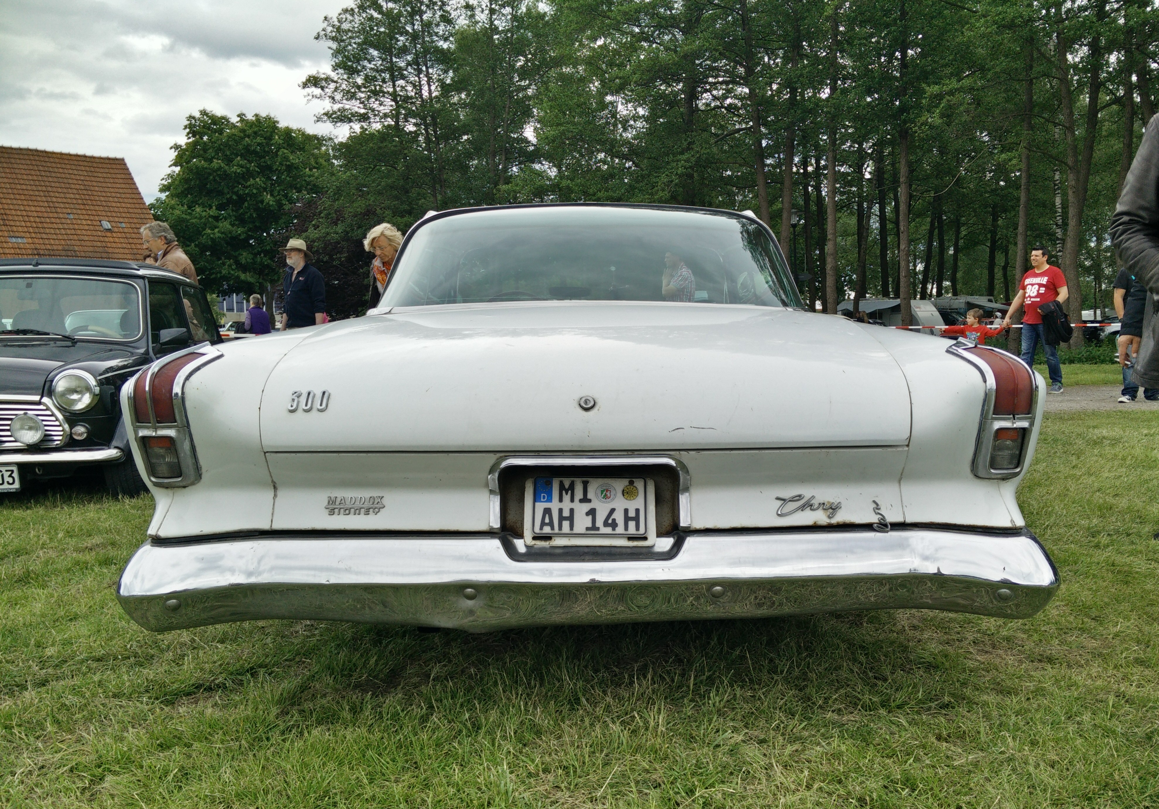 Straßenkreuzer Treffen, Kaunitz 2015